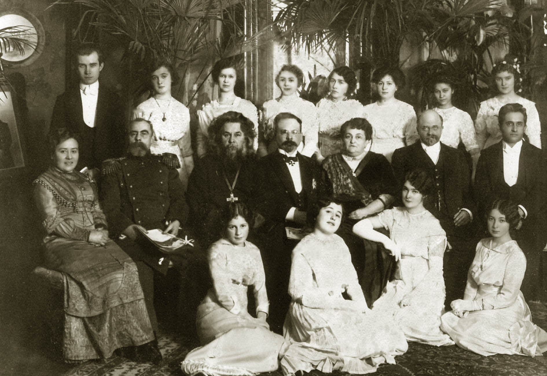 10-летний юбилей курсов М.А.Лохвицкая-Скалон (в центре) Владимир Михайлович Шимкевич (2-й справа) Фёдор Евдокимович Тур (1-й справа)